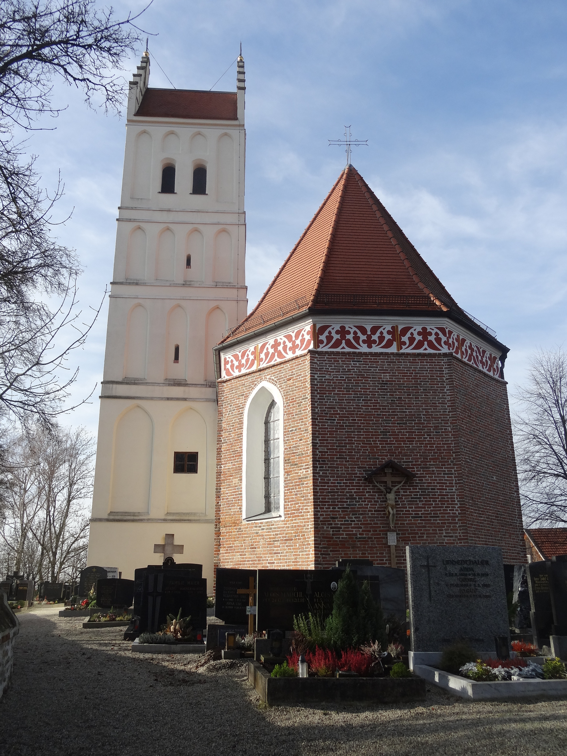 Katholische Pfarrkirche St. Georg in Eugenbach (Altdorf bei Landshut); Ansicht von Osten mit dem Chor in Backsteinbauweise